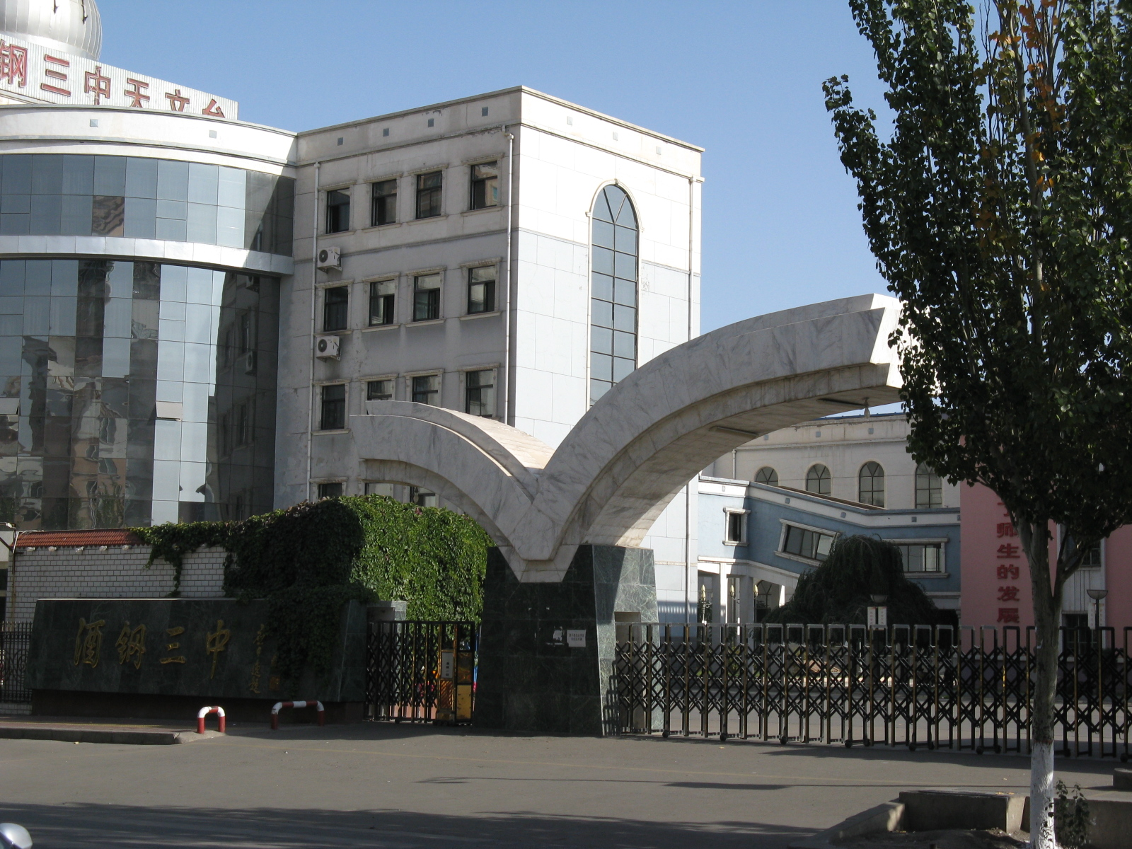 甘肃省嘉峪关市酒钢三中校门